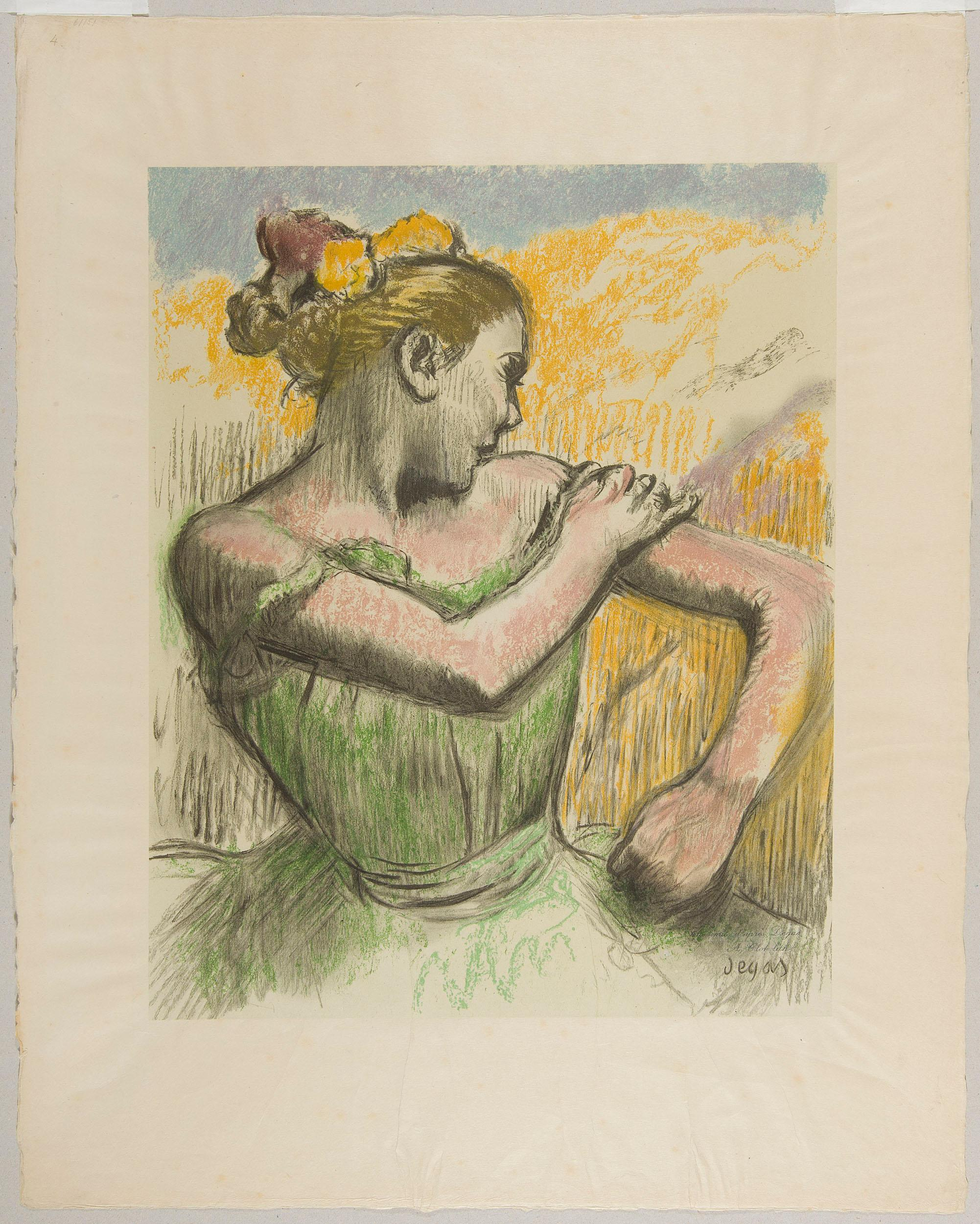 Litografia wg pastelu Edgara Degas, znajdującego się w zbiorach Kunsthalle w Bremie